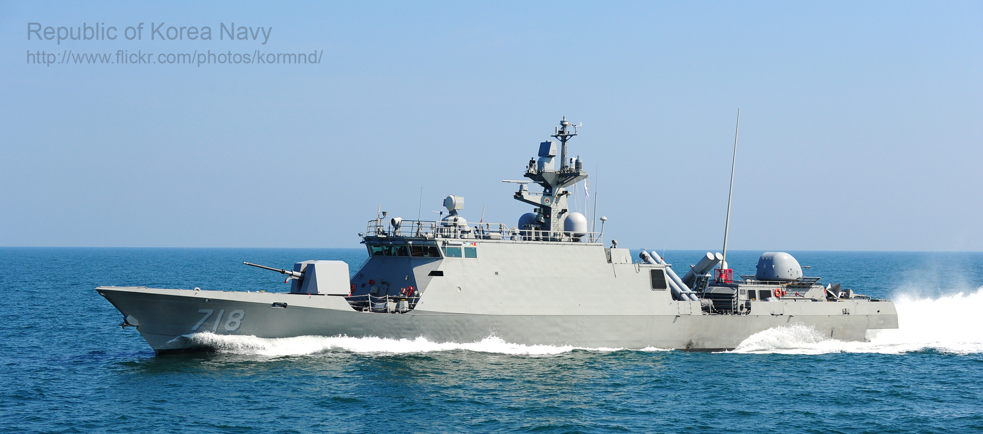 2012. 9.25 서해 NLL해상경계 훈련 장면 촬영자 : 김규성